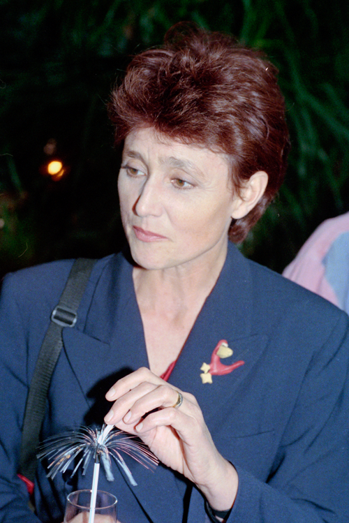 Truus te Selle